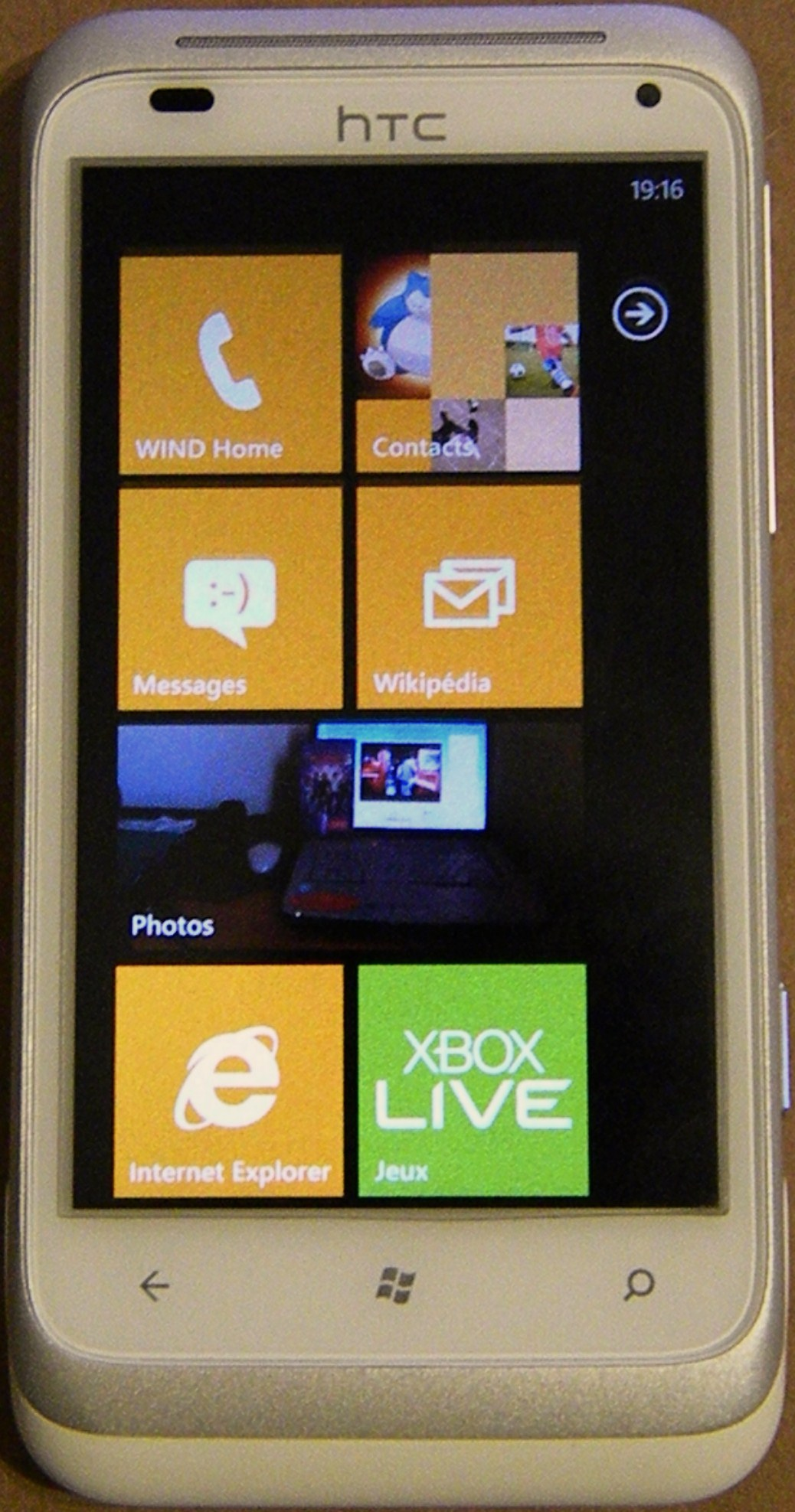 Le téléphone HTC Radar 4G vendu par WIND Mobile.